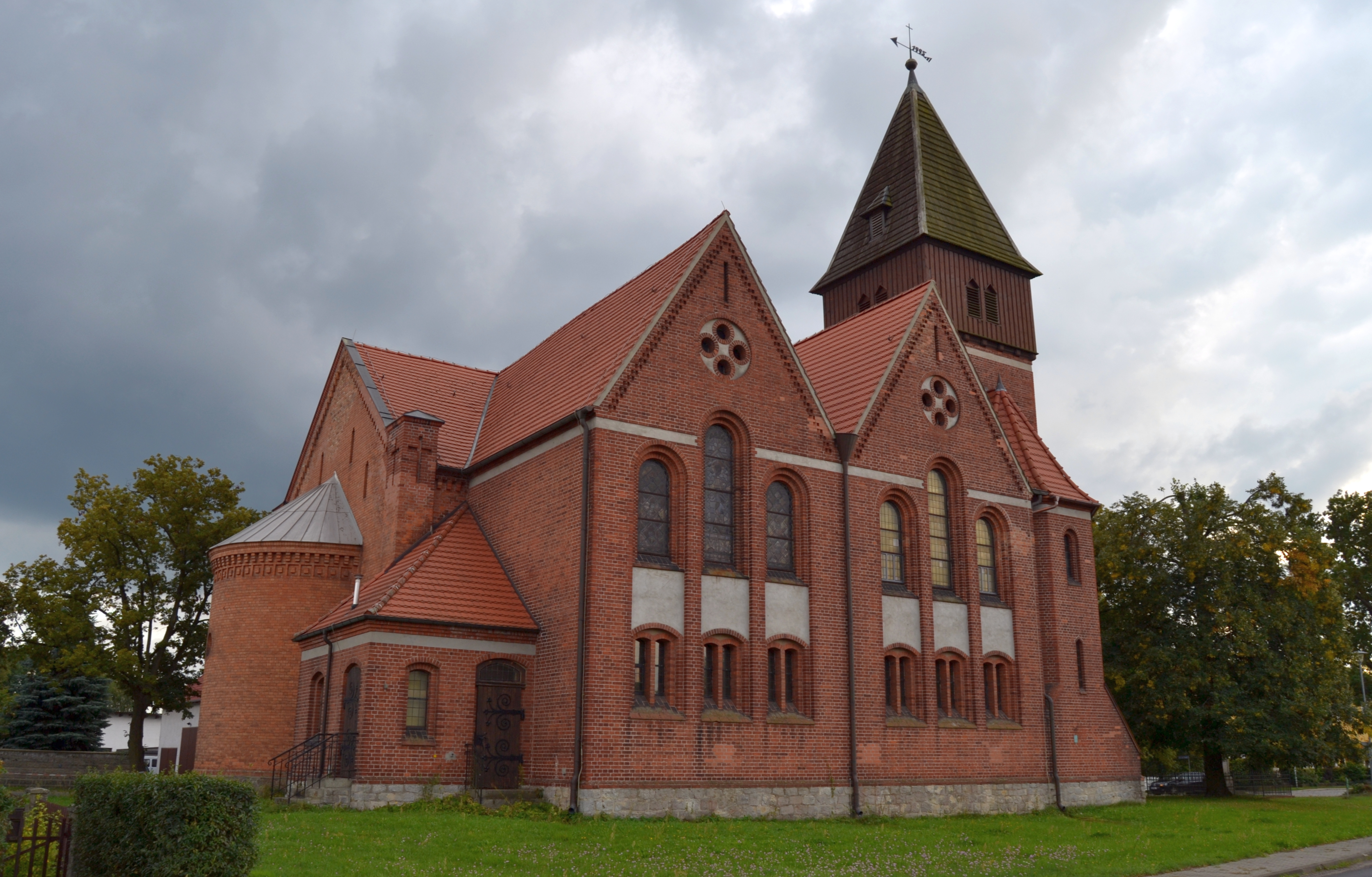 Evangelische Dorfkirche von Spreenhagen; sie wurde im Jahre 1855 erbaut. Sie ist im Rundbogenstil der Schule von Schinkel erbaut. In den Jahren 1901 bis 1903 wurde die Kirche durch einen neugotischen Anbau erweitert. Das Innere stammt aus dieser Zeit.